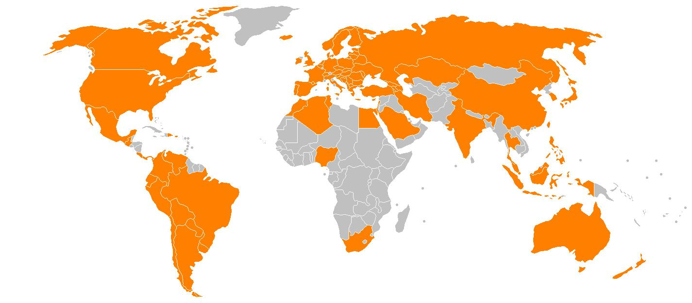 A Buzzerbeater nevű online játék 2008-ban az alábbi országokban elérhető